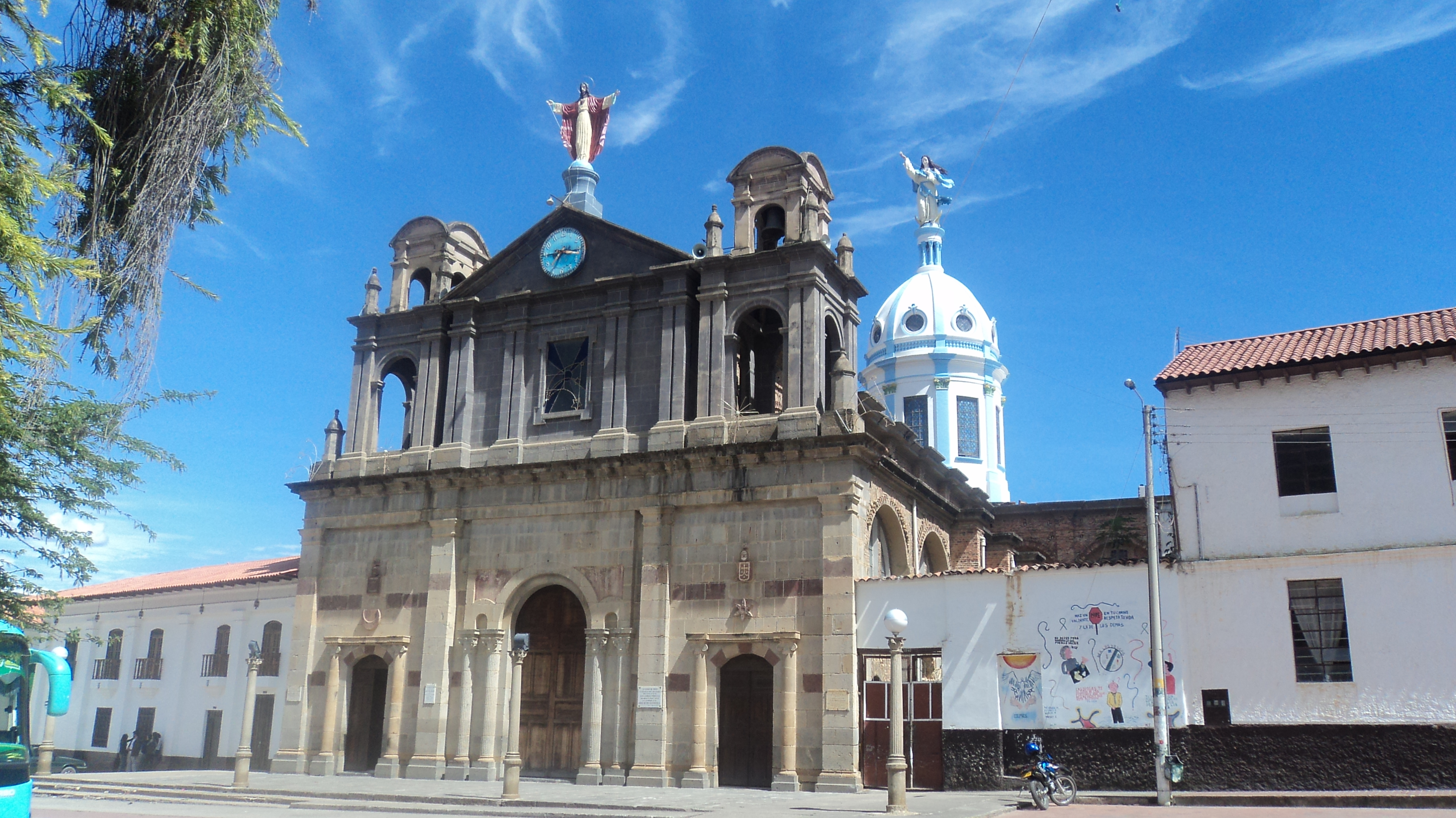 Parque principal Soata